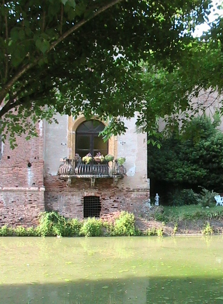 Il fossato del Castello a Scandolara Ripa d'Oglio